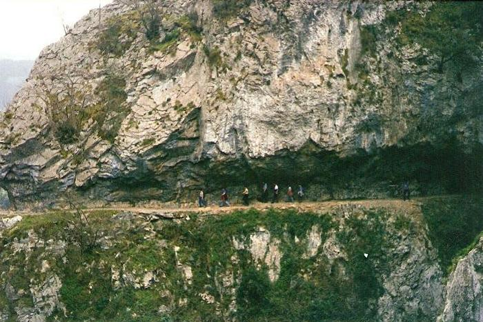 foz de les xanes